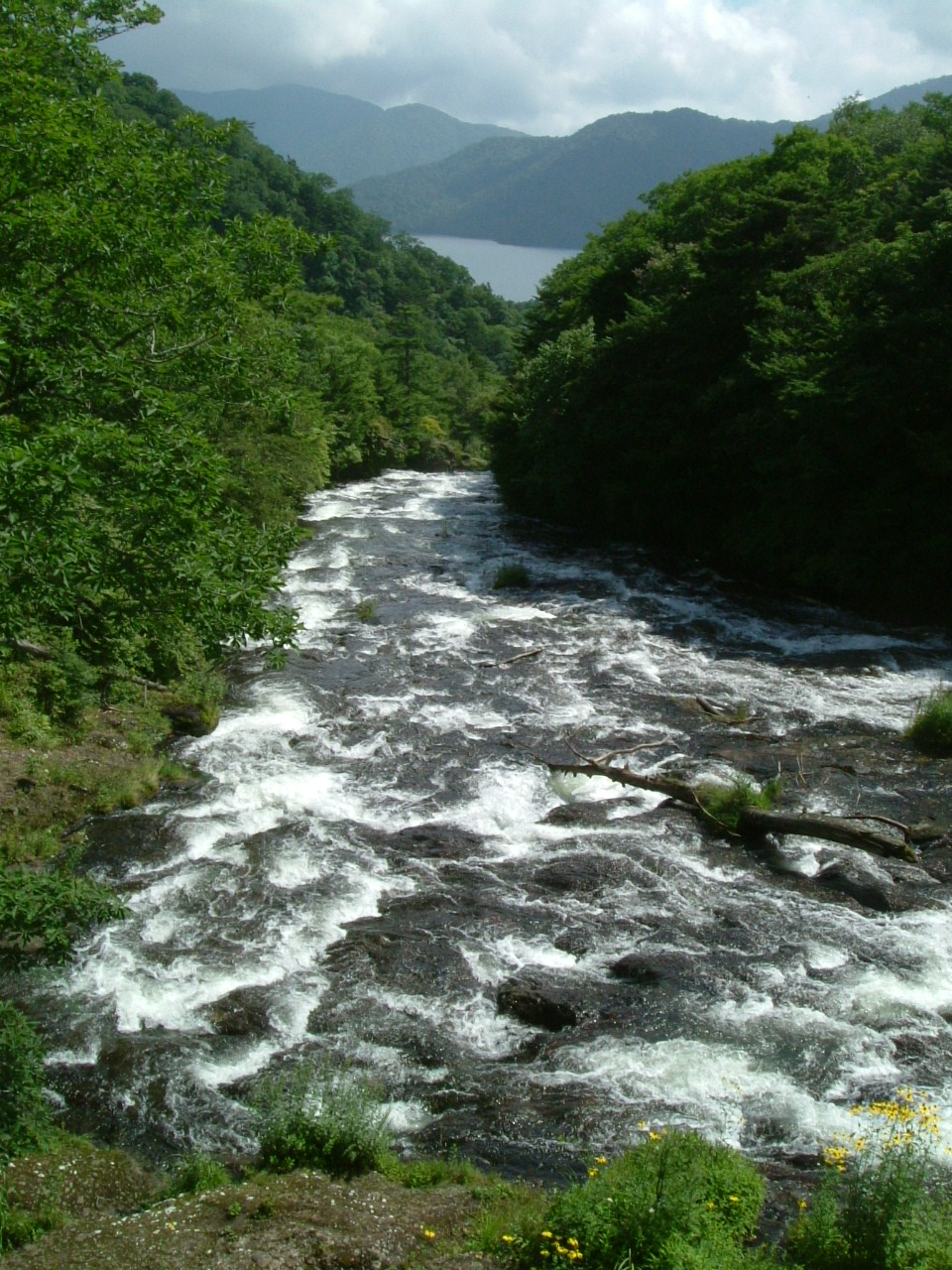 栃木県日光市竜頭の滝（上流部）